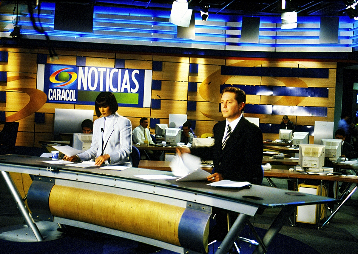 Estudio de Noticias Caracol al iniciar su respectivo noticiero en 1998 a las 7 p.m. Emisión central.